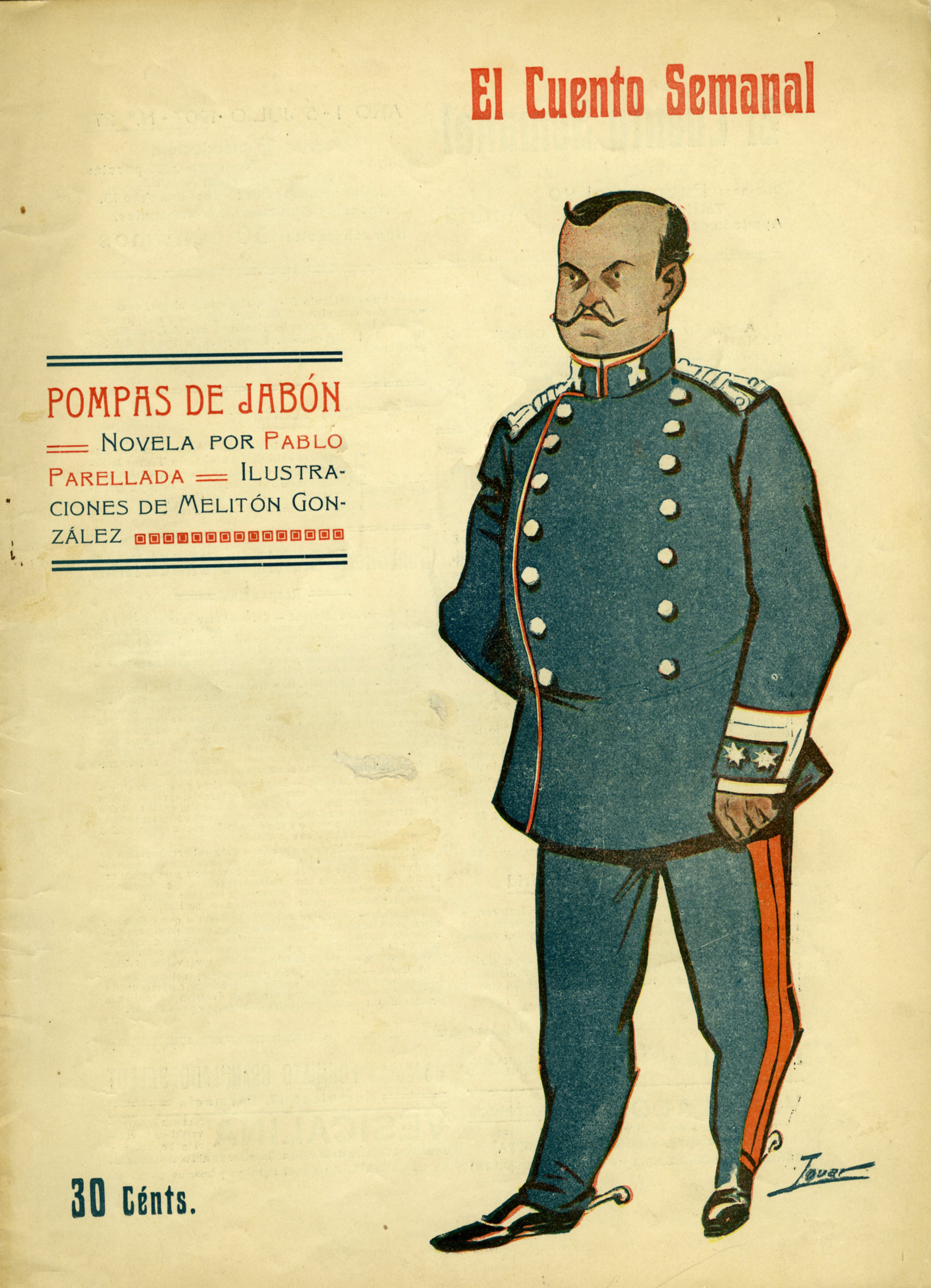 Pompas de jabón, novela de Pablo Parellada, ilustraciones de Melitón González.